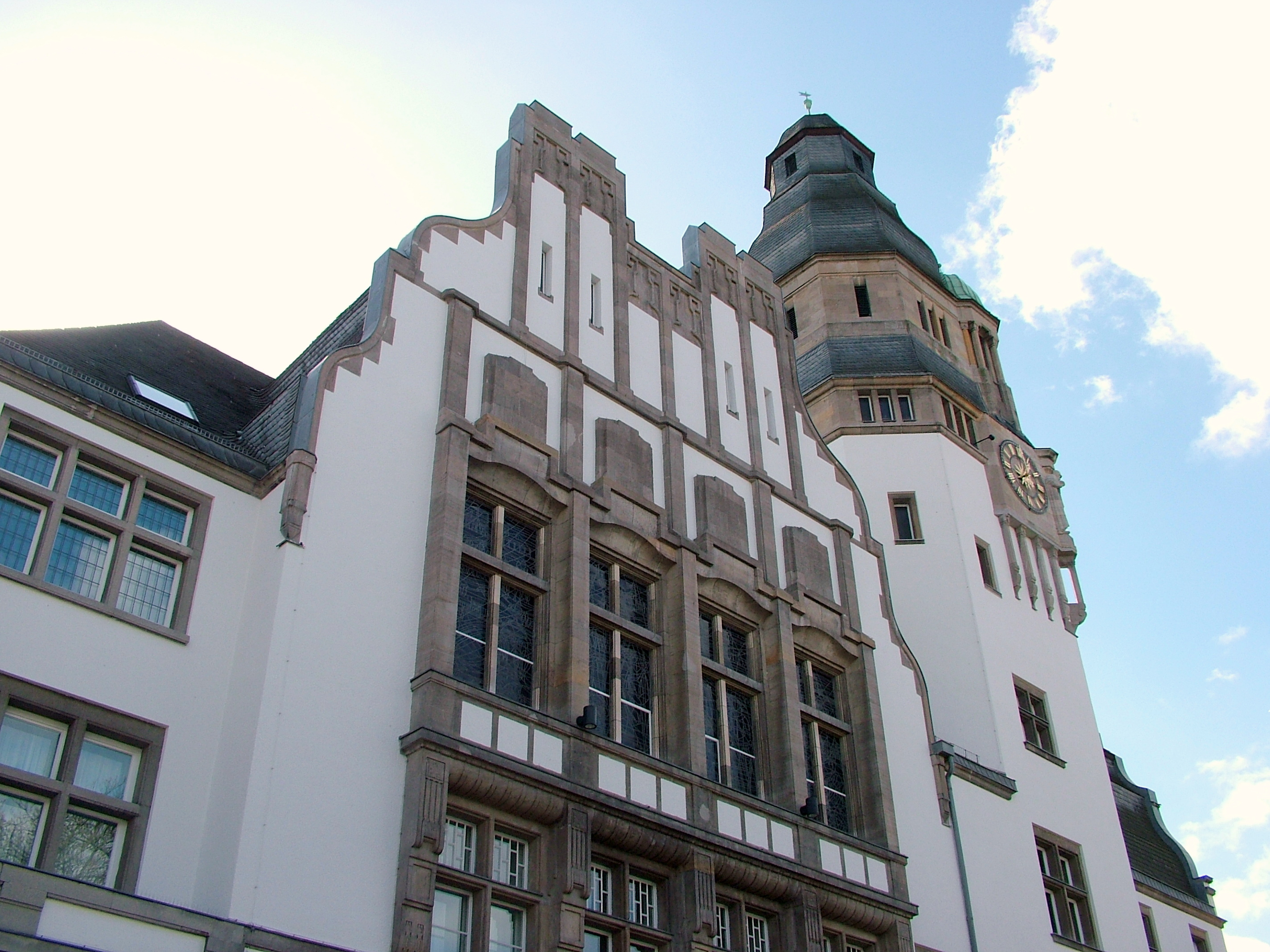 Rathausturm, Gladbeck